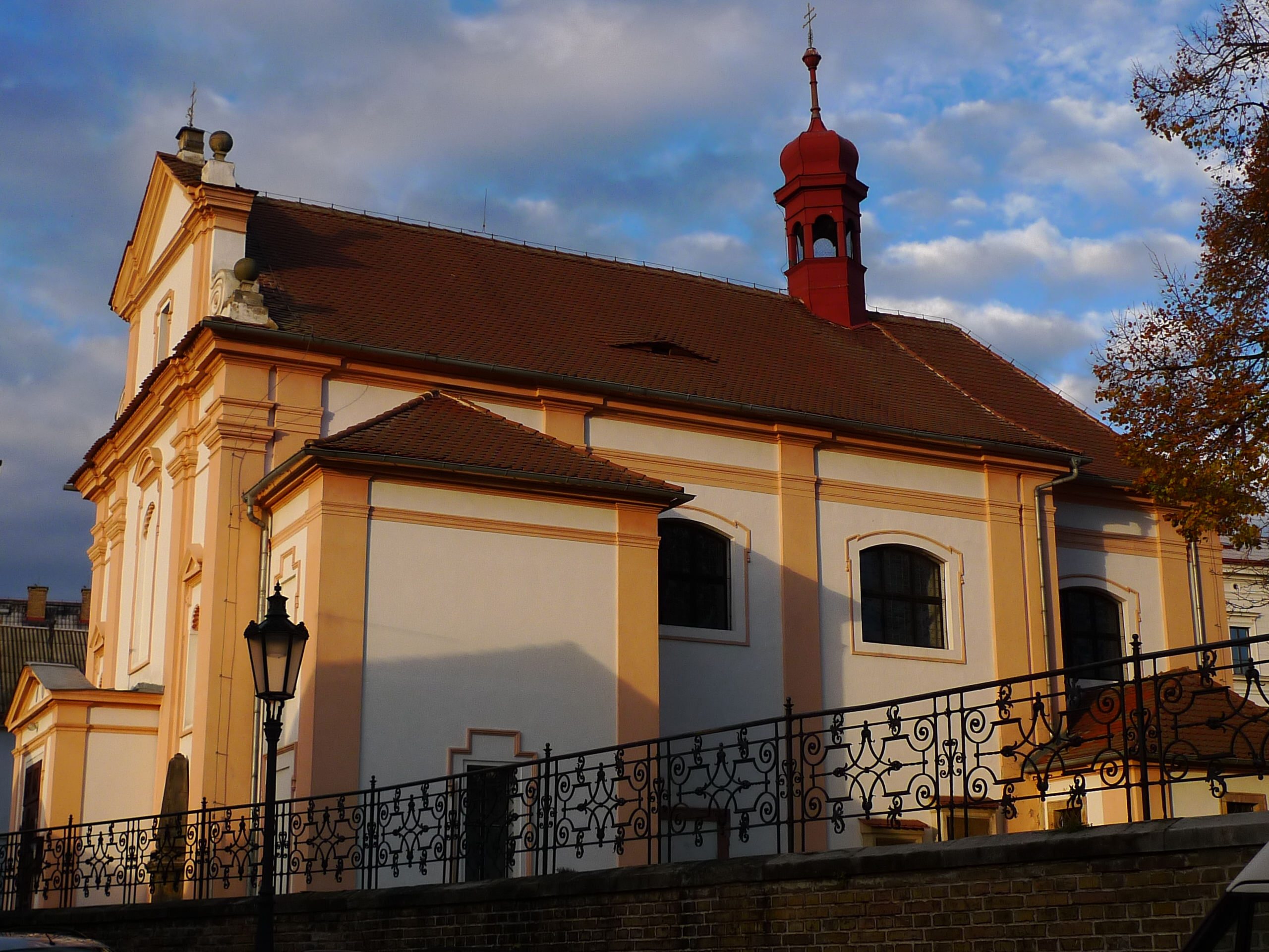 Kostel sv. Vojtěcha (Litoměřice), Litoměřice